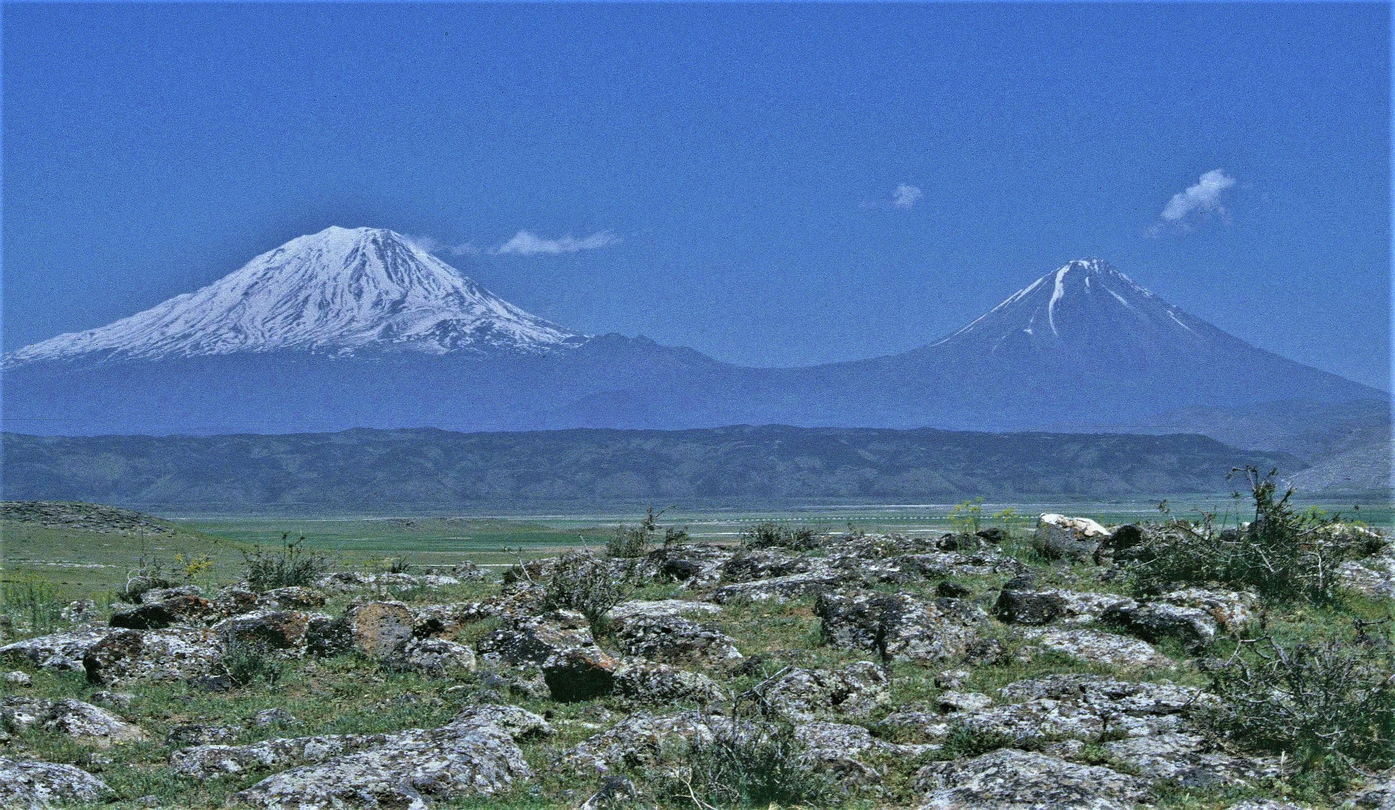 Großer und kleiner Ararat